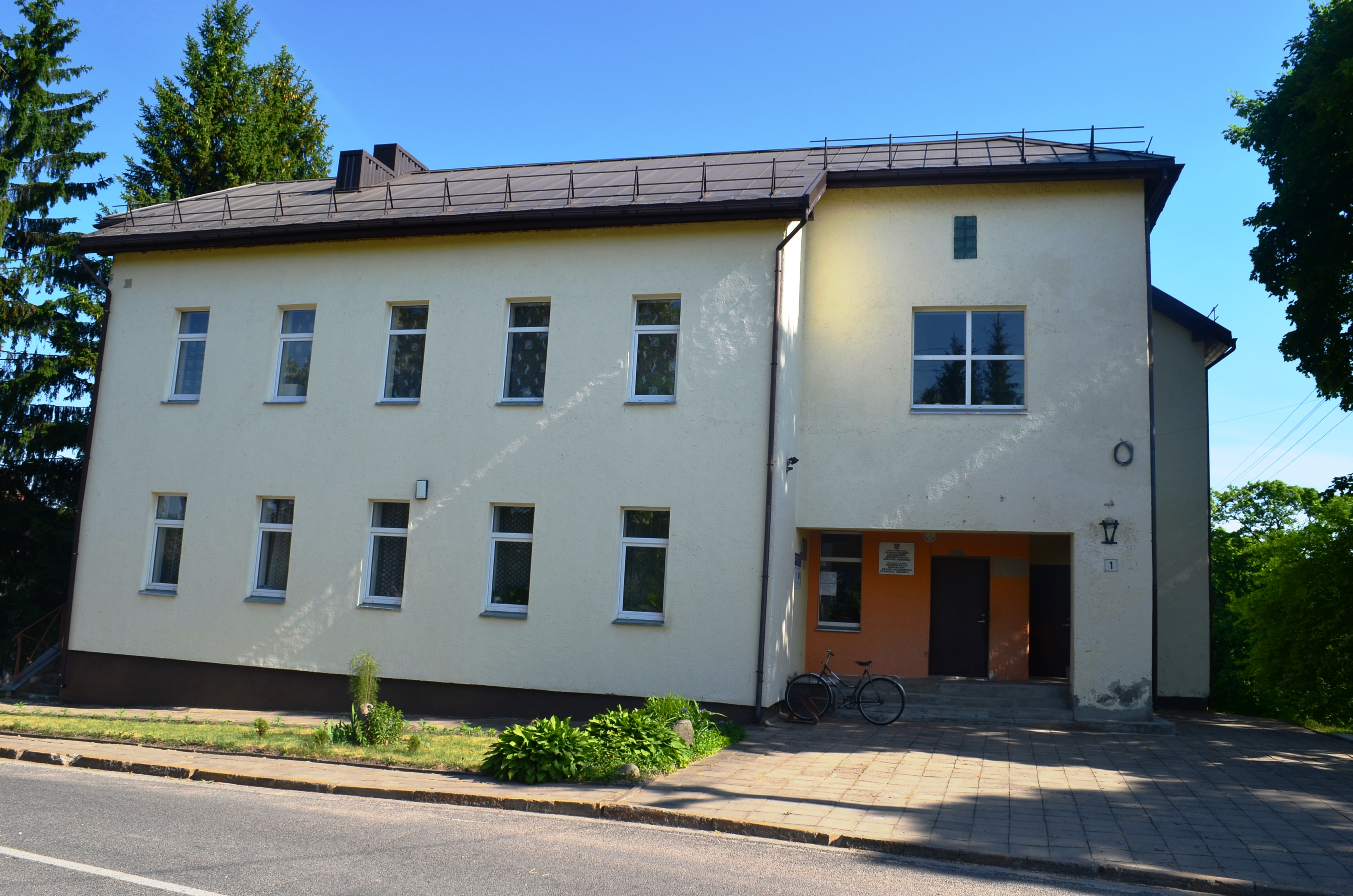 Sužionių seniūnija, Vilniaus raj.